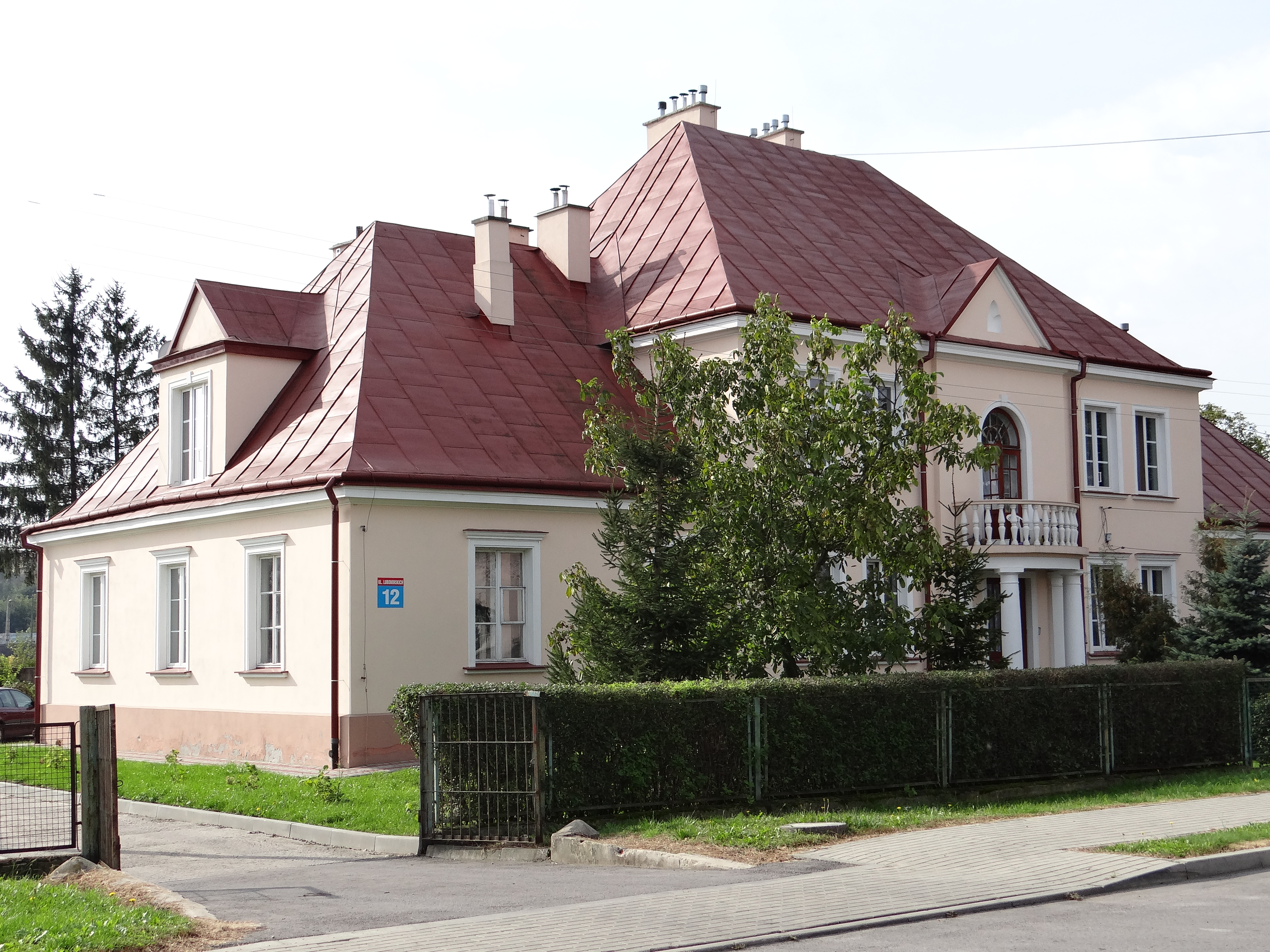 Przeworsk, willa, pocz. XX